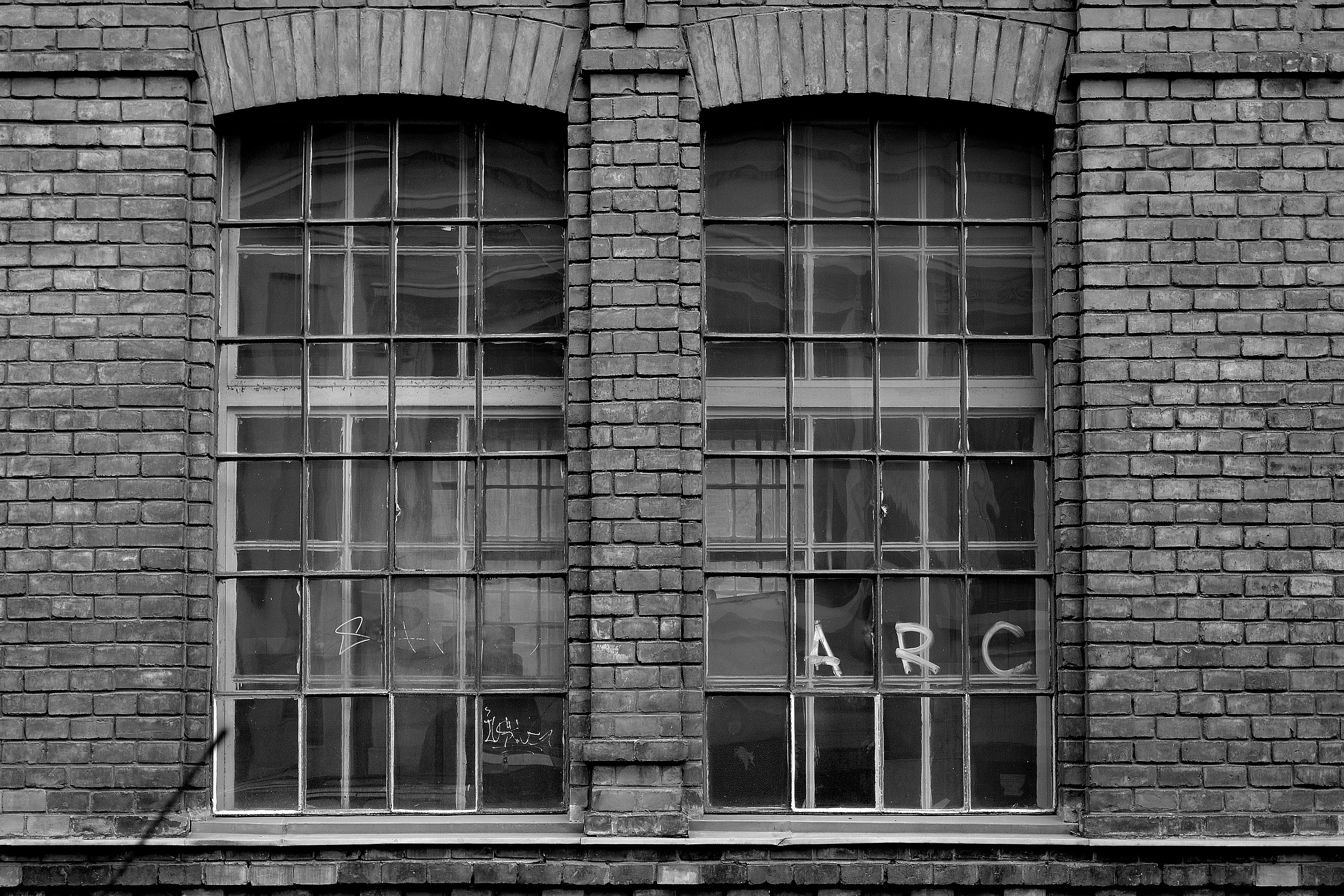 A lebontott Nemzeti Színház megmaradt kiszolgáló épülete